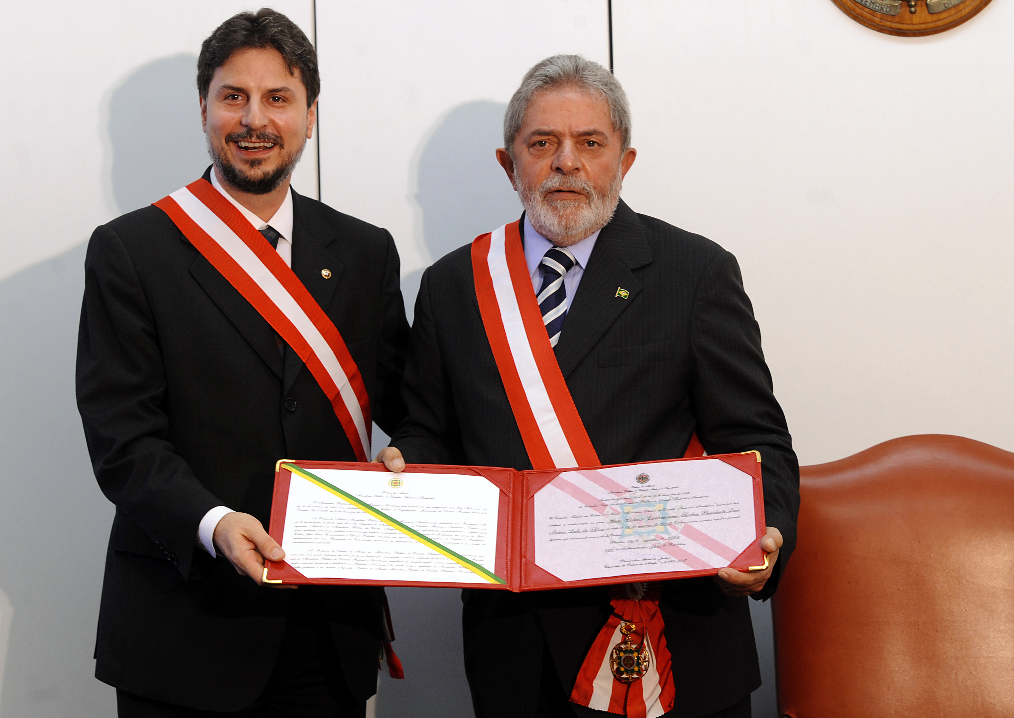 O presidente Luiz Inácio Lula da Silva é condecorado com o Grão-Colar da Ordem do Mérito, do Ministério Público do Distrito Federal e Territórios.